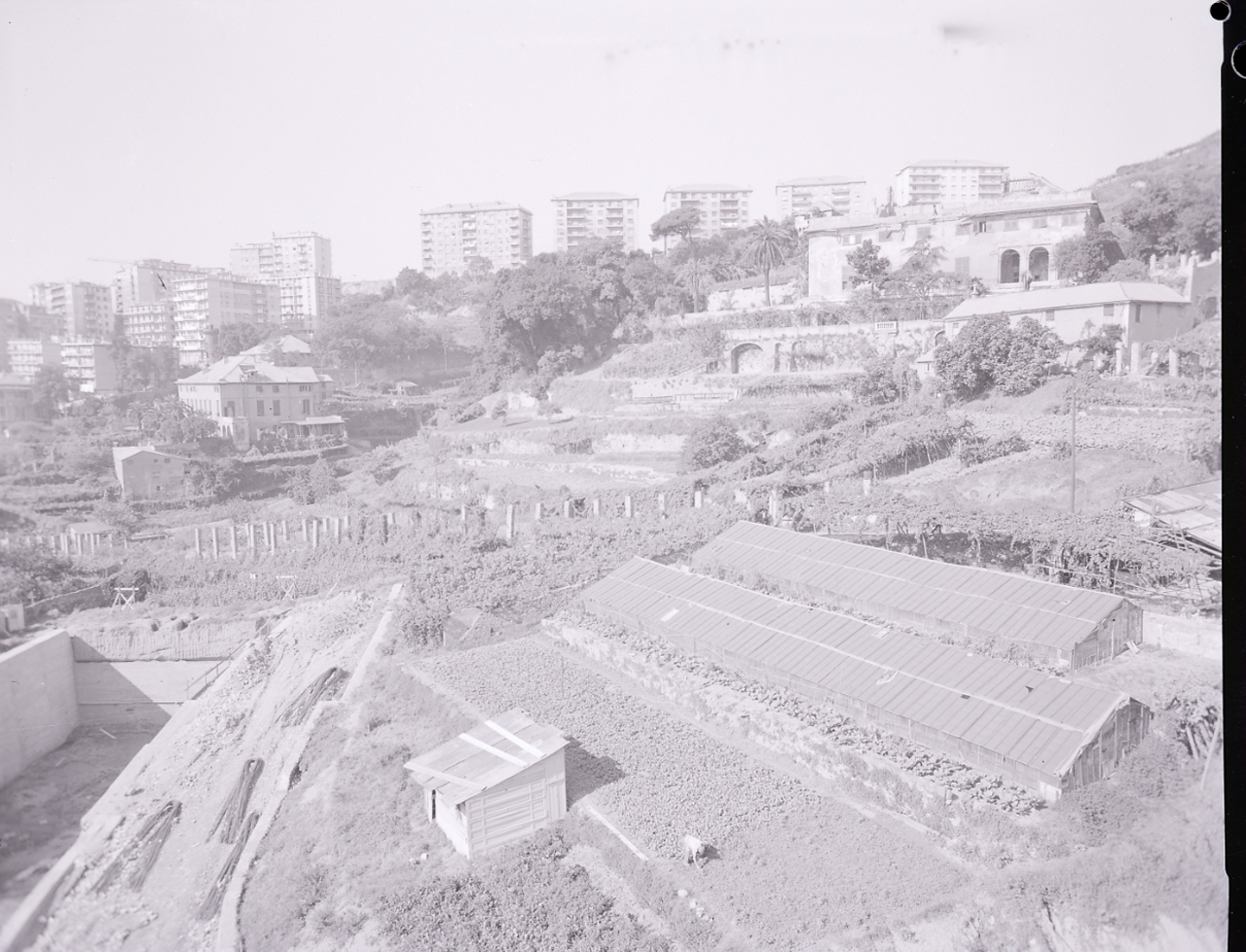 Riviera di Ponente. Genova. Cornigliano. Ville immerse nel verde. Veduta generale. Servizio fotografico : Genova, 1963 / Paolo Monti. - Buste: 4, Fototipi: 4 : Negativo b/n, gelatina bromuro d'argento/ pellicola ; 10x12. - ((Serie costituita da 4 buste sciolte di negativi identificati con i nn.: 7472, 7473, 7474, 7475. - Su rubrica denominata "R 1 - Monti/ 1 aprile 1963 - 6 giugno 1964/ 6000-8193" in corrispondenza dell'indicazione della suddetta serie appunto manoscritto: "Ville in Zona verde - verso Cornigliano". - Il negativo identificato con il numero 46397 è stato realizzato per Zodiac. - Occasione: Documentazione per la pubblicazione: Italia Nostra (a cura di), "Le ville genovesi", catalogo della mostra, Genova 1962, Genova, Comune di Genova, 1967. - Fonte: Monografia di Italia Nostra (a cura di): Le ville genovesi, catalogo della mostra, Genova 1962, Genova, Comune di Genova (1967). - Fonte: Lettera di Paolo Monti: I. Carteggi/ Genova - Enrico (1963-1966), presso Archivio Paolo Monti. Camicia con documenti dattiloscritti e manoscritti vari relativi al lavoro eseguito per Italia Nostra: preventivi, lettere, inventari. - Fonte: Rubrica di Paolo Monti: Archivio fino 1-4-1961/ 31-3-1963 (1961-1963), presso Archivio Paolo Monti. - Fonte: Agenda di Paolo Monti: R 1 - Monti/ 1 aprile 1963 - 6 giugno 1964/ 6000-8193 (1963-1964), presso Archivio Paolo Monti